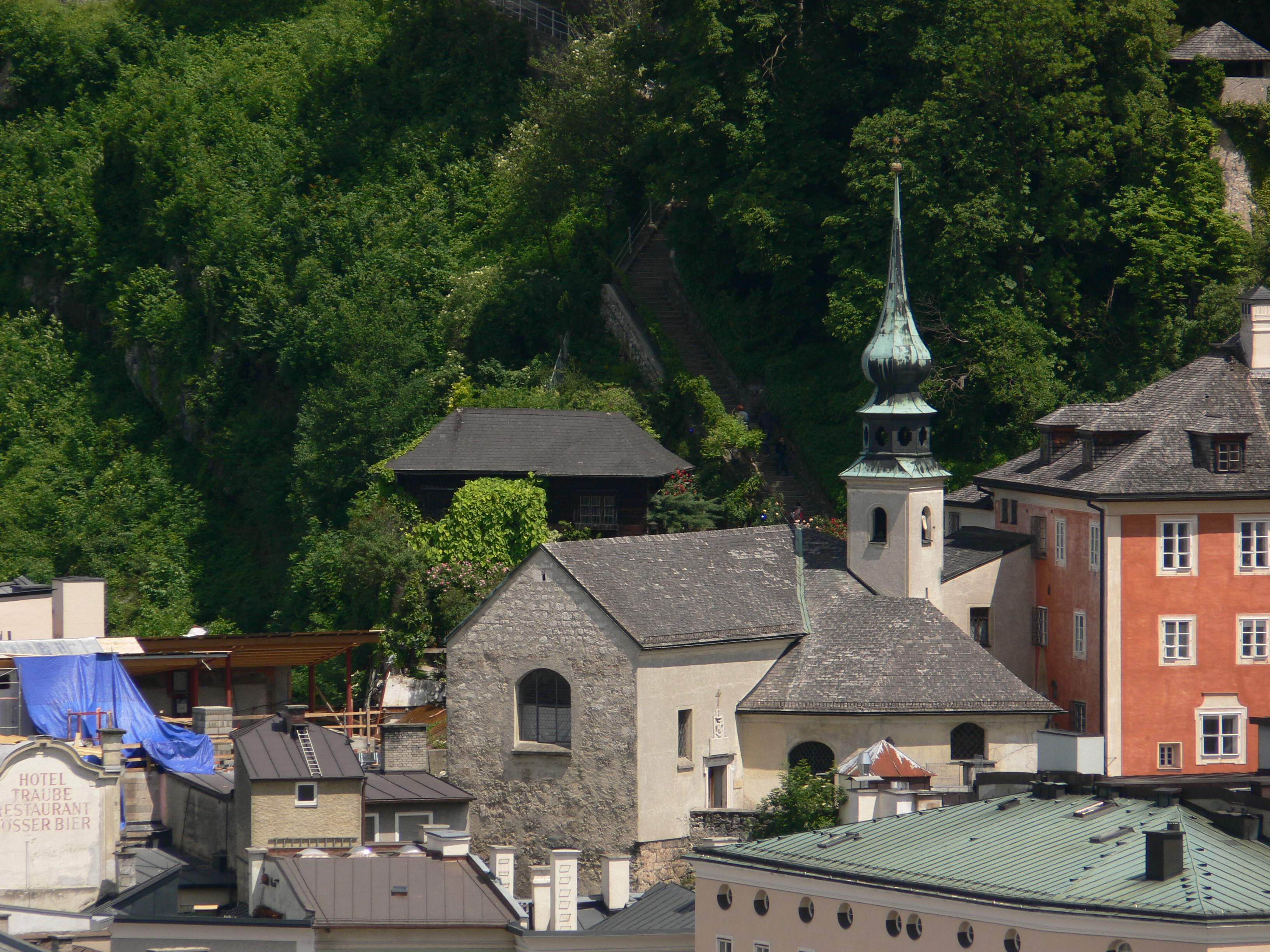 Salzburg, Aussicht vom Mönchsberg Imbergkirche